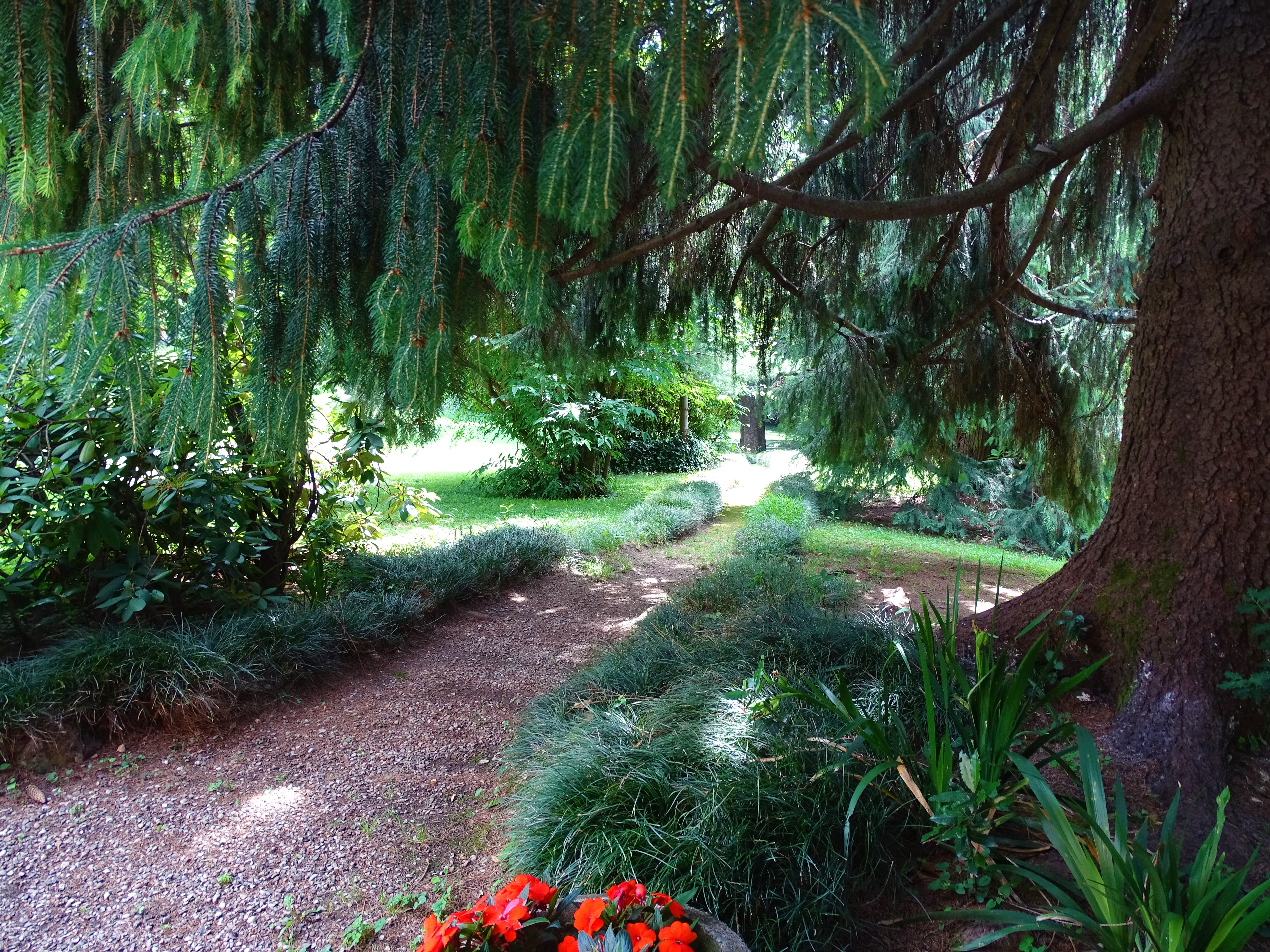 parco di Villa Castiglioni Fisogni This is a photo of a monument which is part of cultural heritage of Italy.